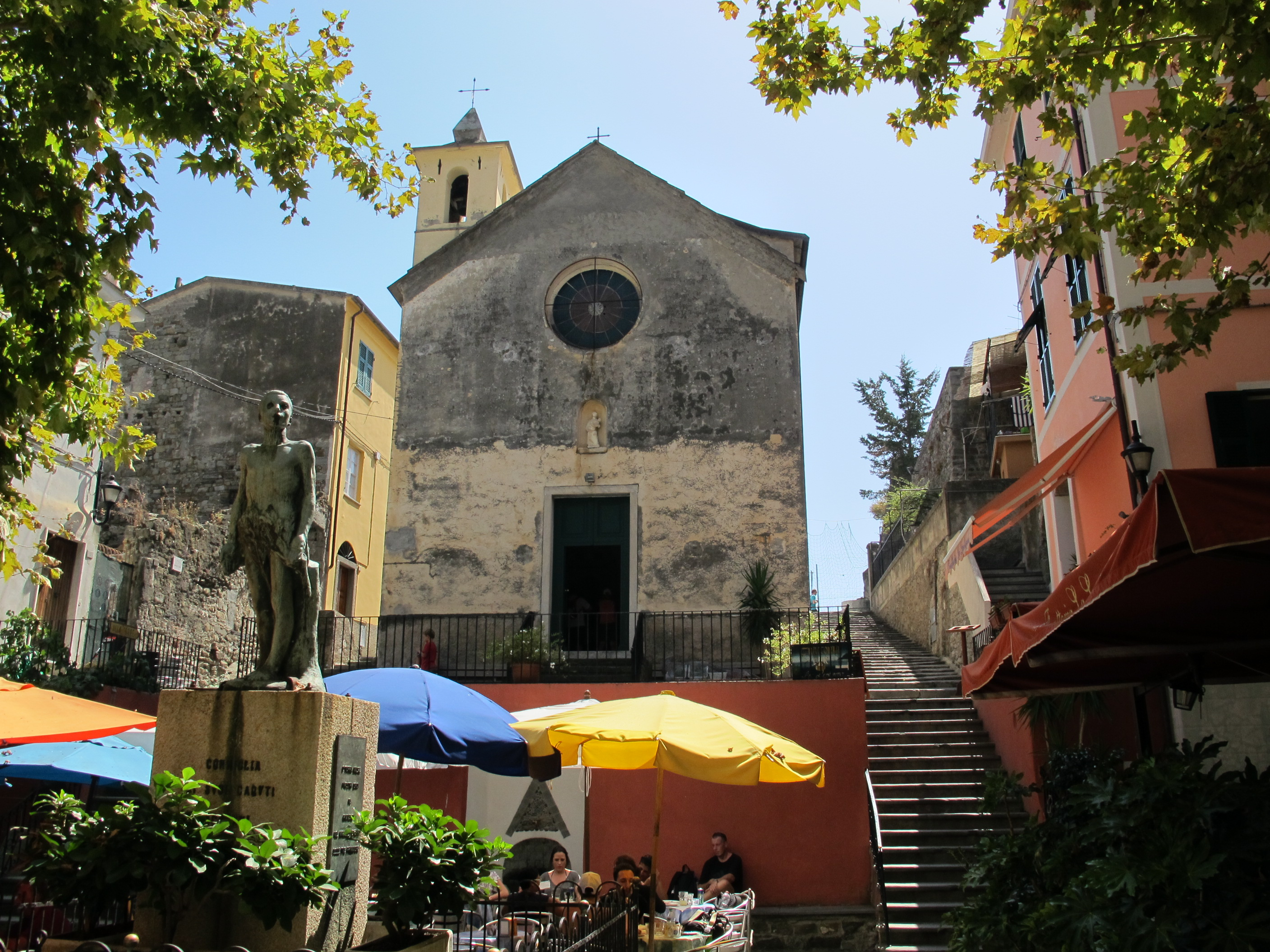 Corniglia, oratorio dei disciplinati